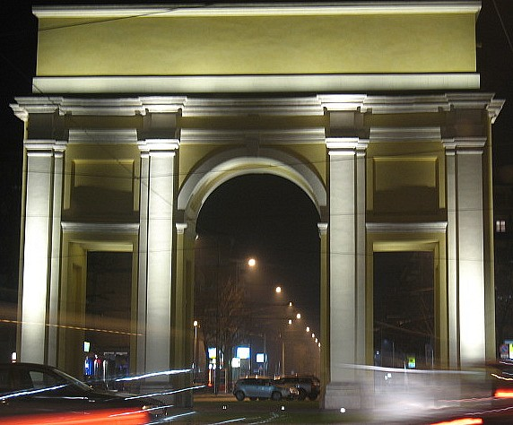 Arco di San Lazzaro a Parma. Foto scattata dal sottoscritto